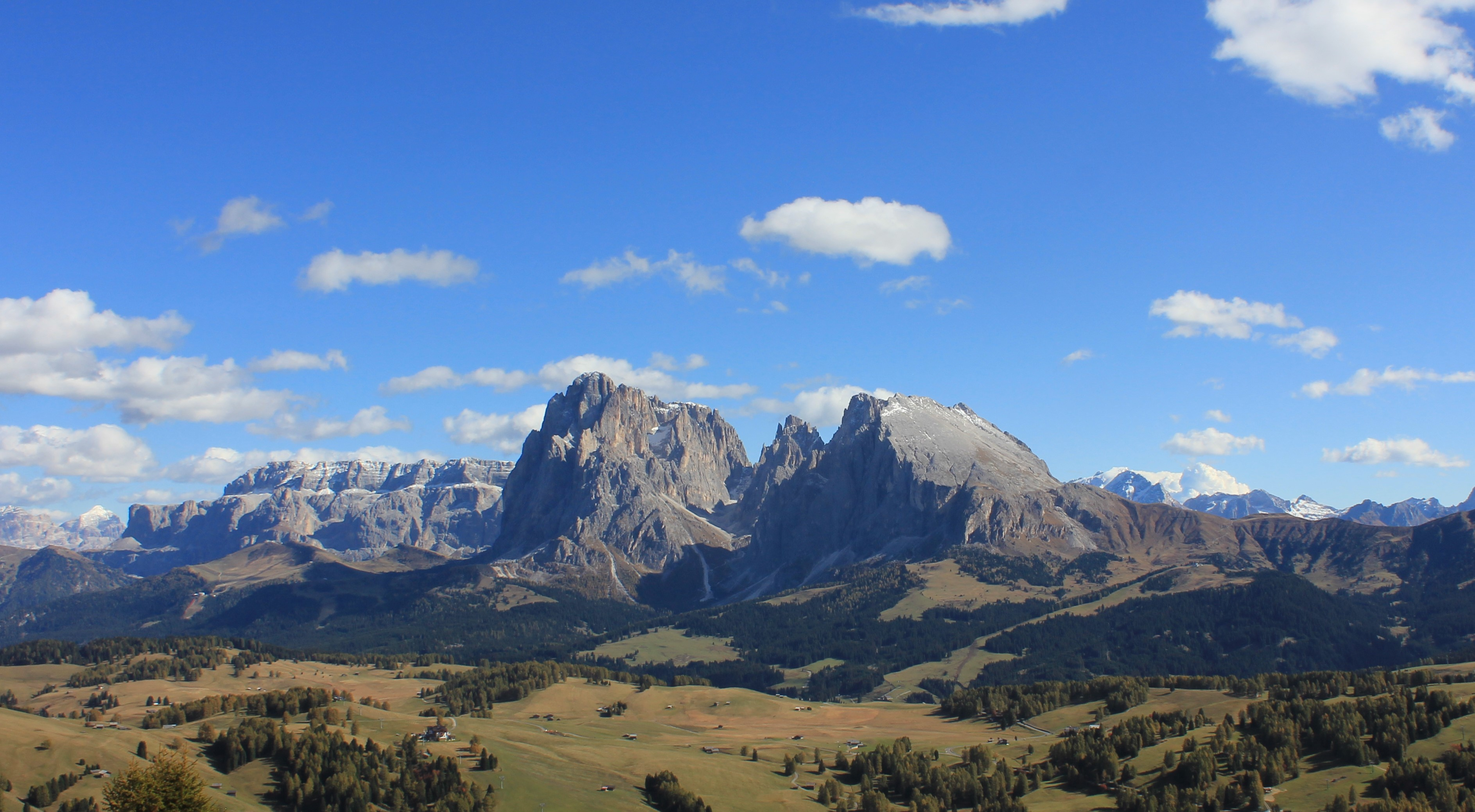 Langkofel und Plattkofel. Dahinter Marmolatagipfel und Sellagruppe